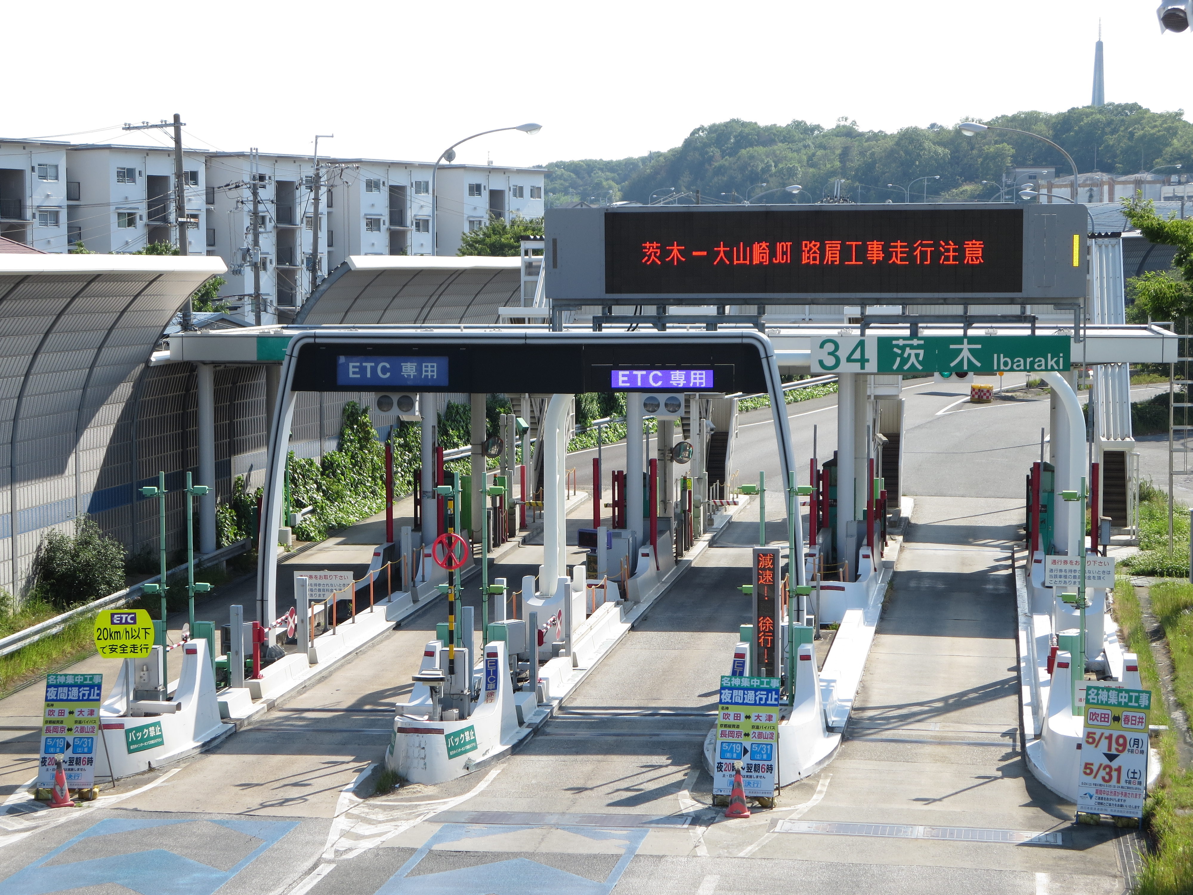 名神高速道路茨木IC入口を東側(国道171号線高架上)より撮影